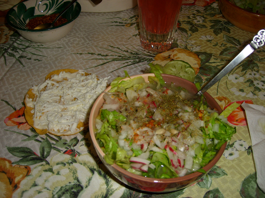 Un Pozole aderezado con lechuga, cebolla, rábano, limón, chile y orégano. Pozole.